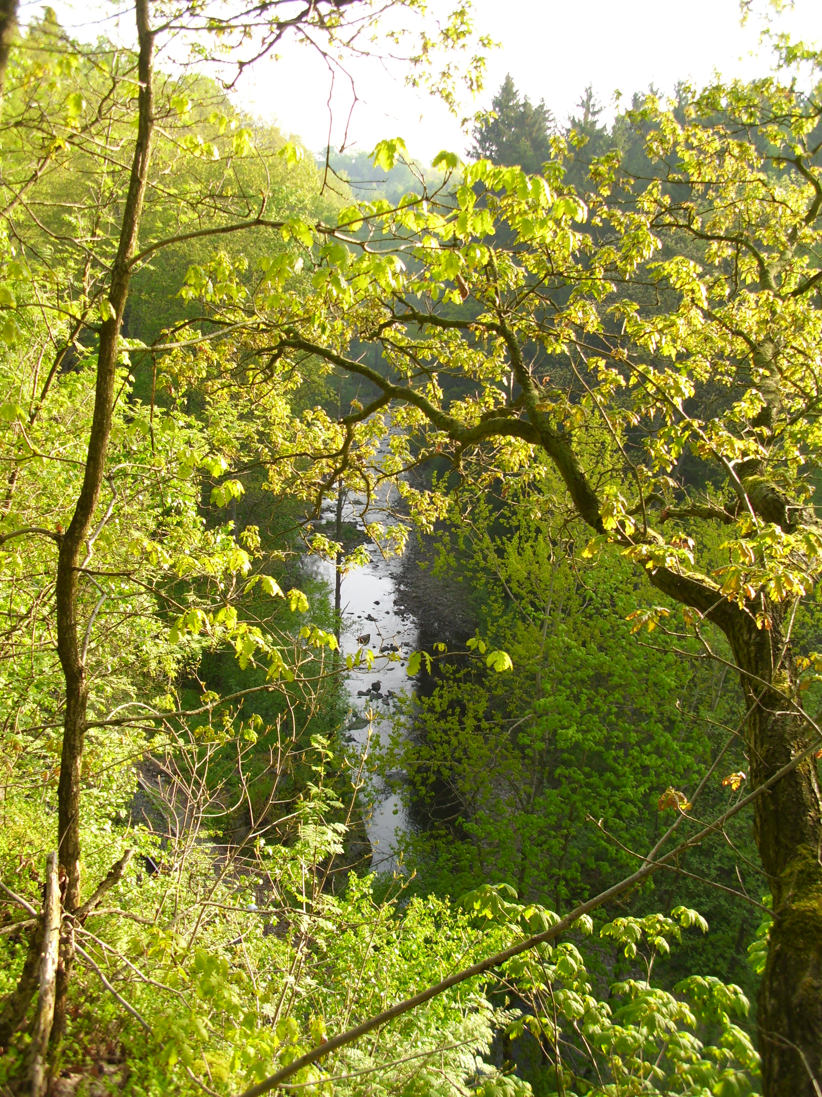 Blick von oberhalb der Bahnbrücke über den Langegrund in den Seifersdorfer Grund